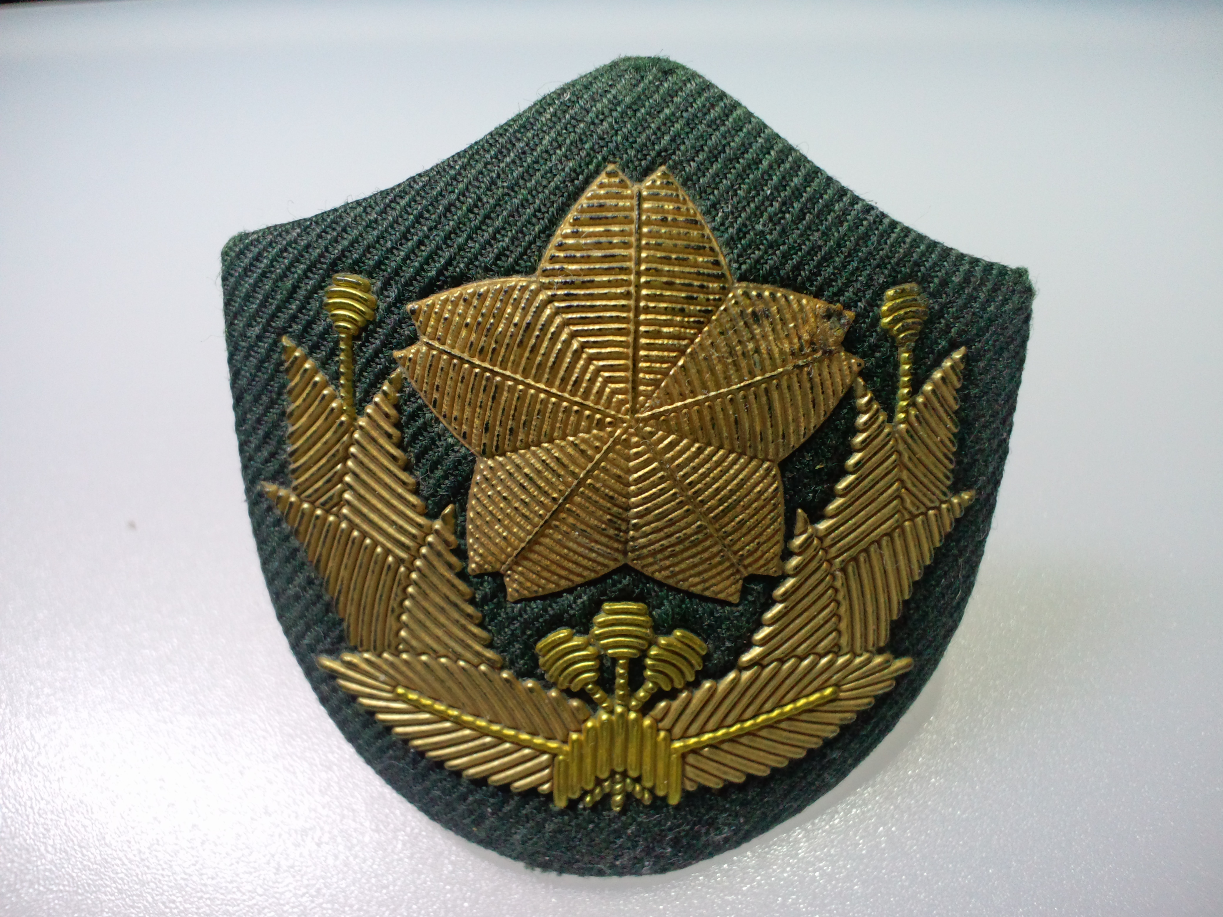 91式曹・幹部用正帽章